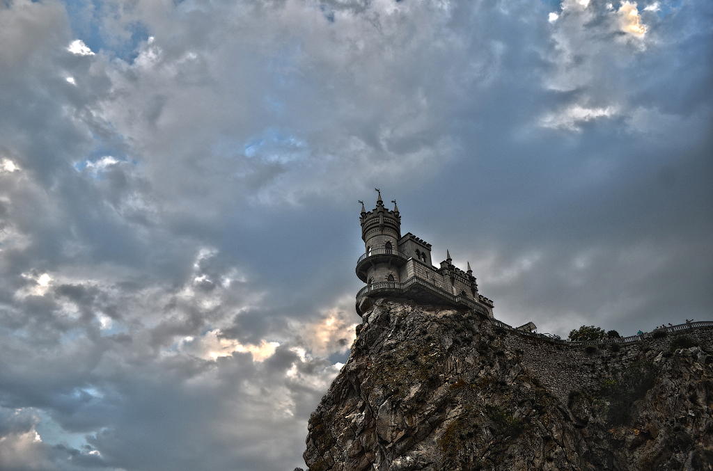 Палац «Ластівчине гніздо», Гаспра, вул. Алупкінське шосе, 9, літер «А»